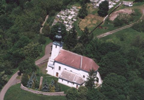 Preĝejo de Bernecebaráti.